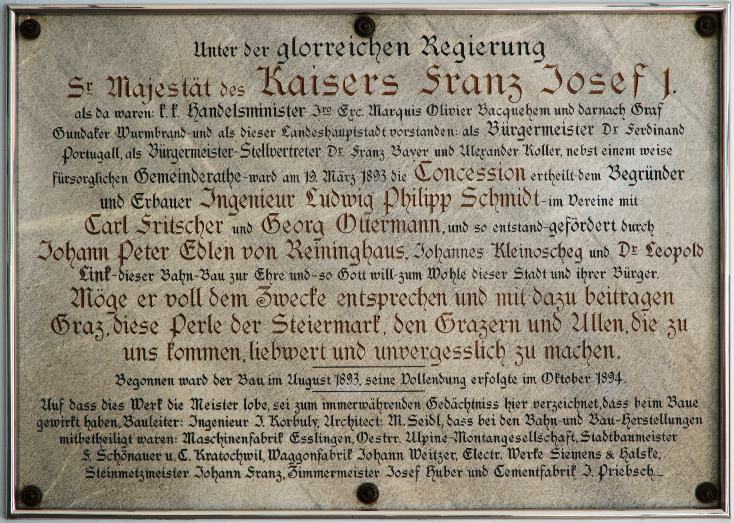 Graz, Schloßbergbahn, Talstation, Plakette